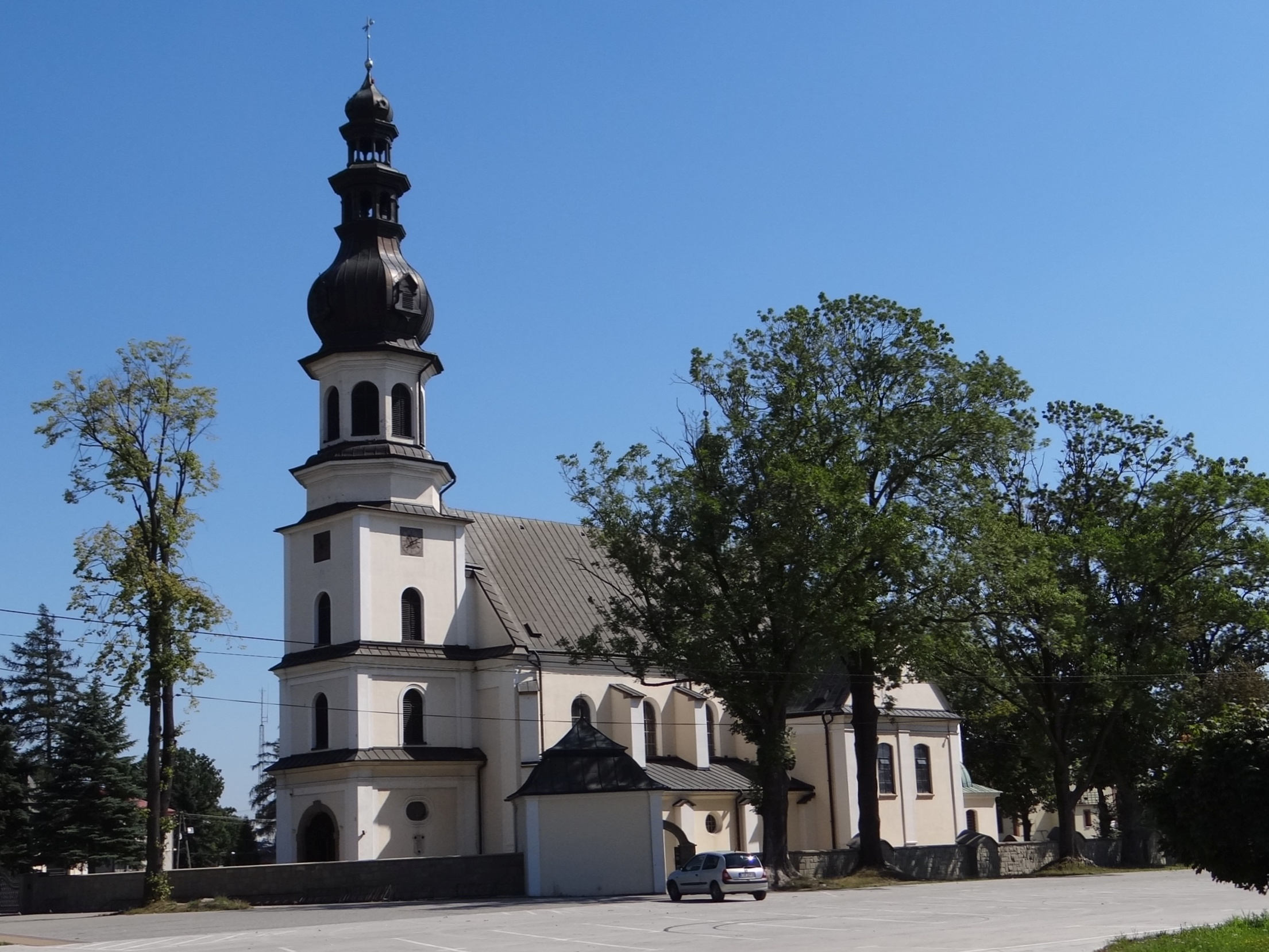 Wojnicz - rzymskokatolicki kościół parafialny pw. św. Wawrzyńca, XV, XVIII